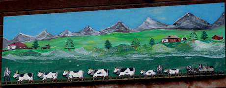 Poya : Estavannens, Fribourg, Switzerland.